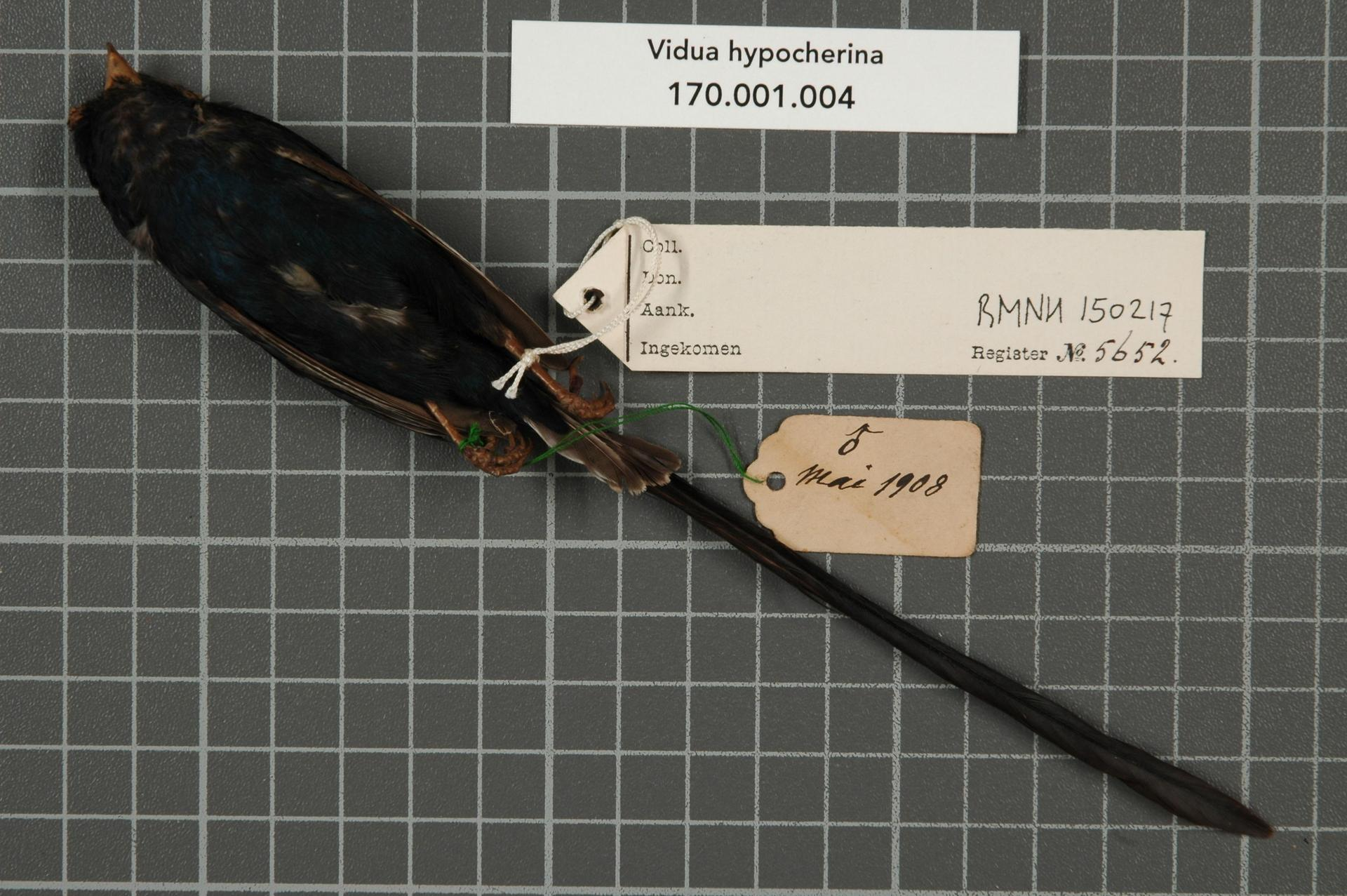 Presua hypocherina J. & E. Verreaux, 1856